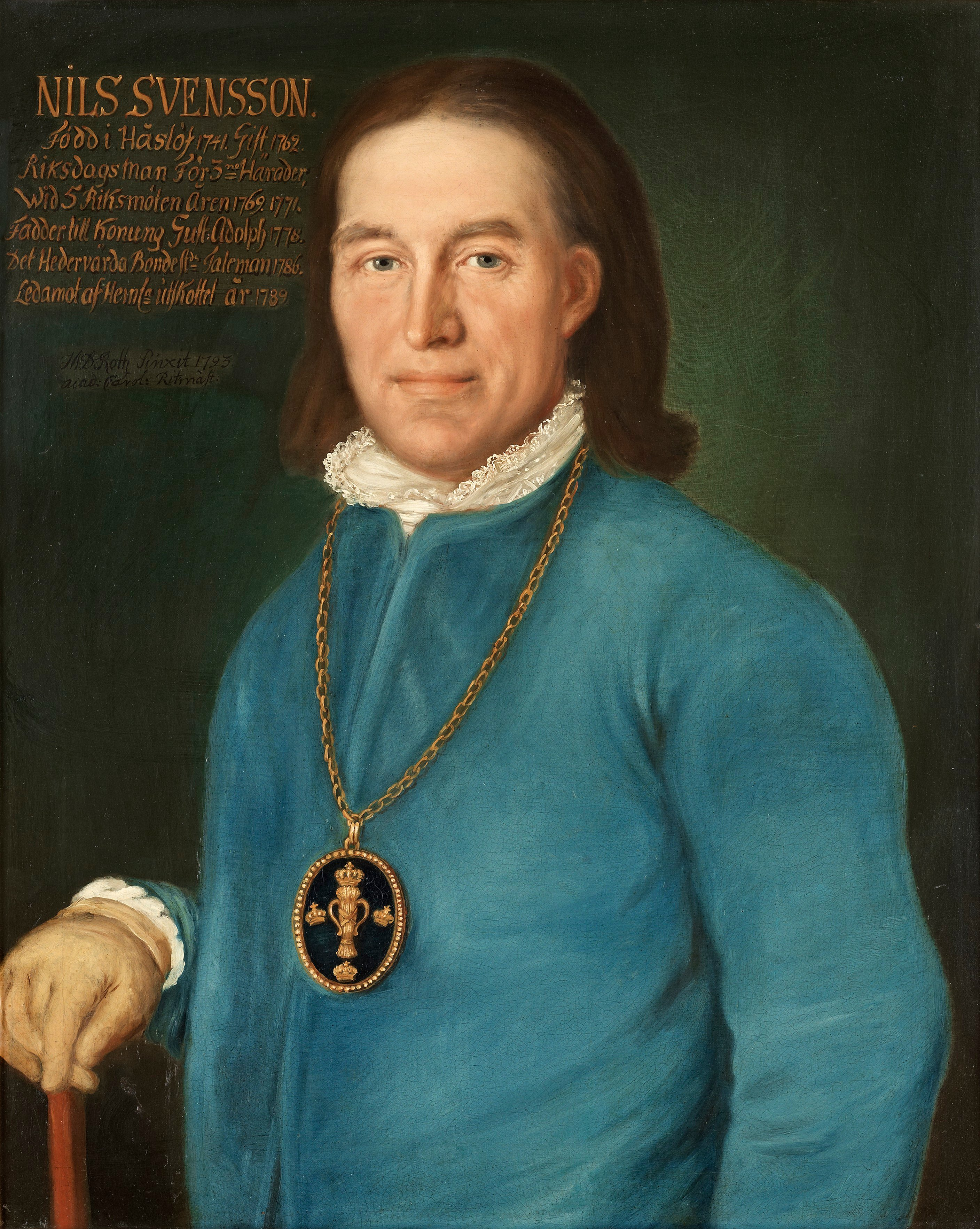 Riksdagsmannen och Bondeståndets talman Nils Svensson i Håslöv (1741-1815)